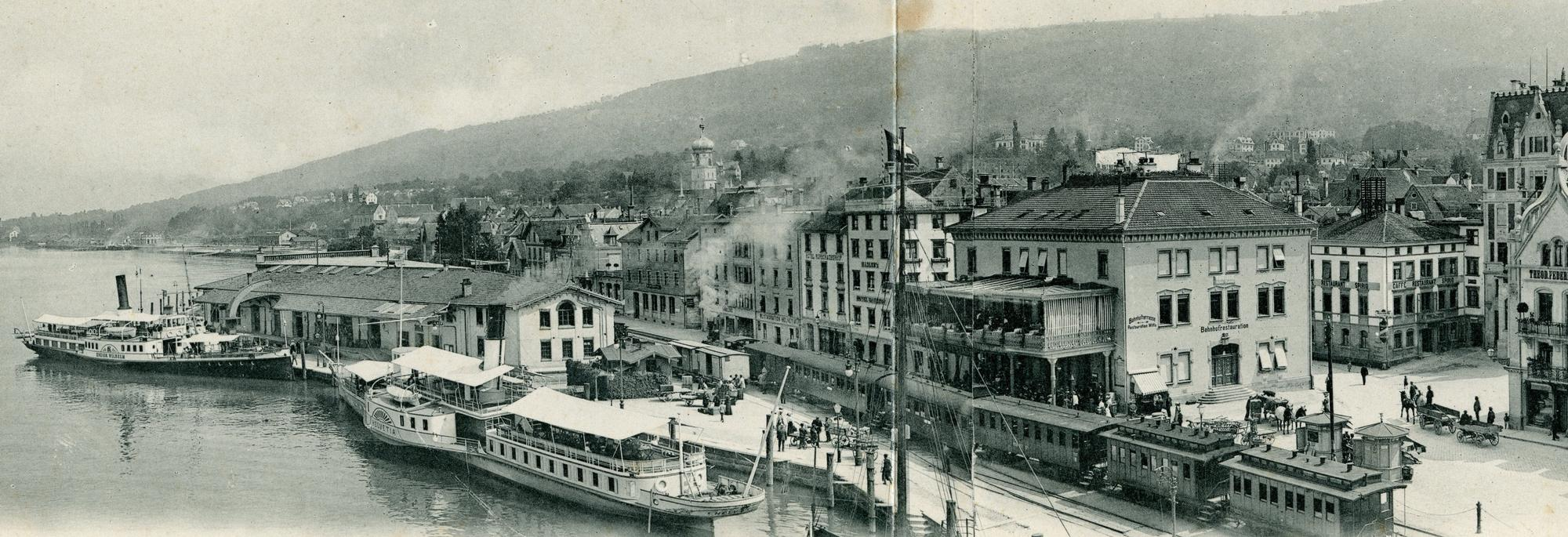 Hafen Rorschach um 1900